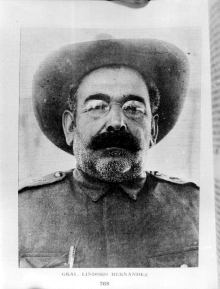 Fotografía del militar Lindoro Hernandez